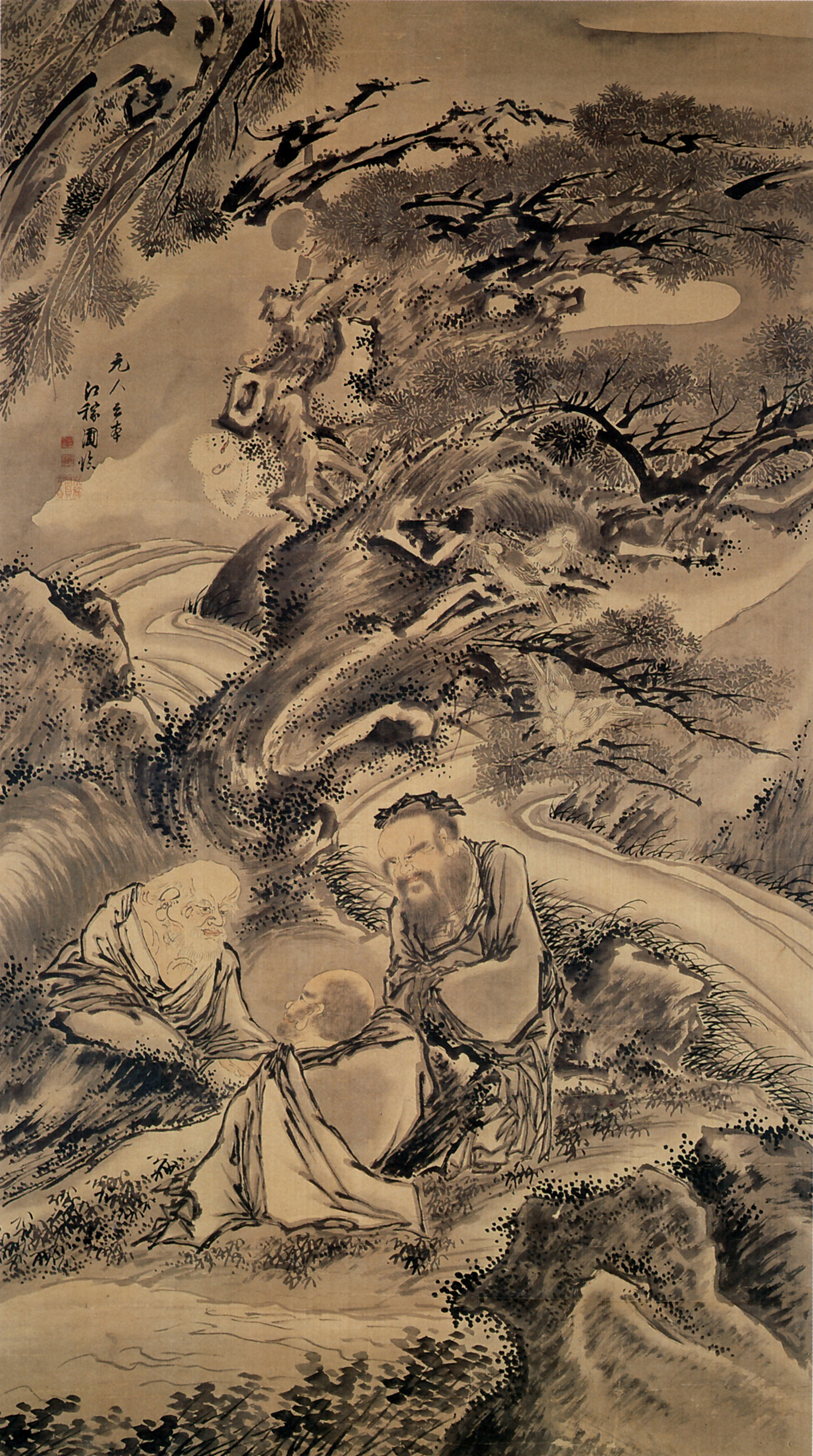 江稼圃 松下三賢図 絹本墨画淡彩 江戸時代中期 橋本コレクション